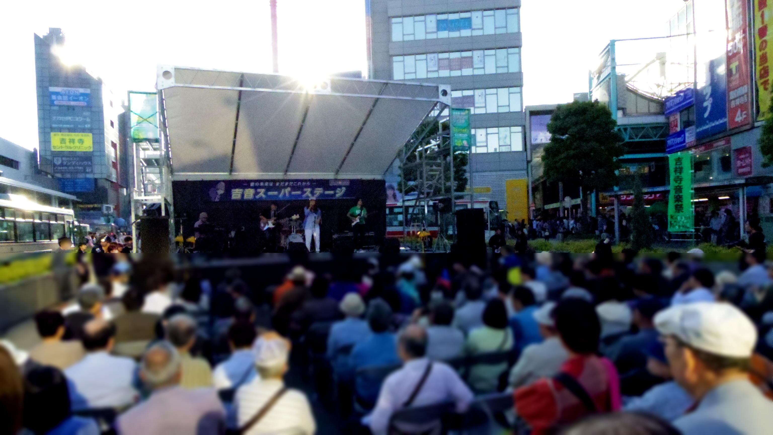 毎年ゴールデンウィークに開かれる「吉祥寺音楽祭」。2015年5月5日、吉祥寺駅北口広場で行われた「吉音スーパーステージ」の模様。